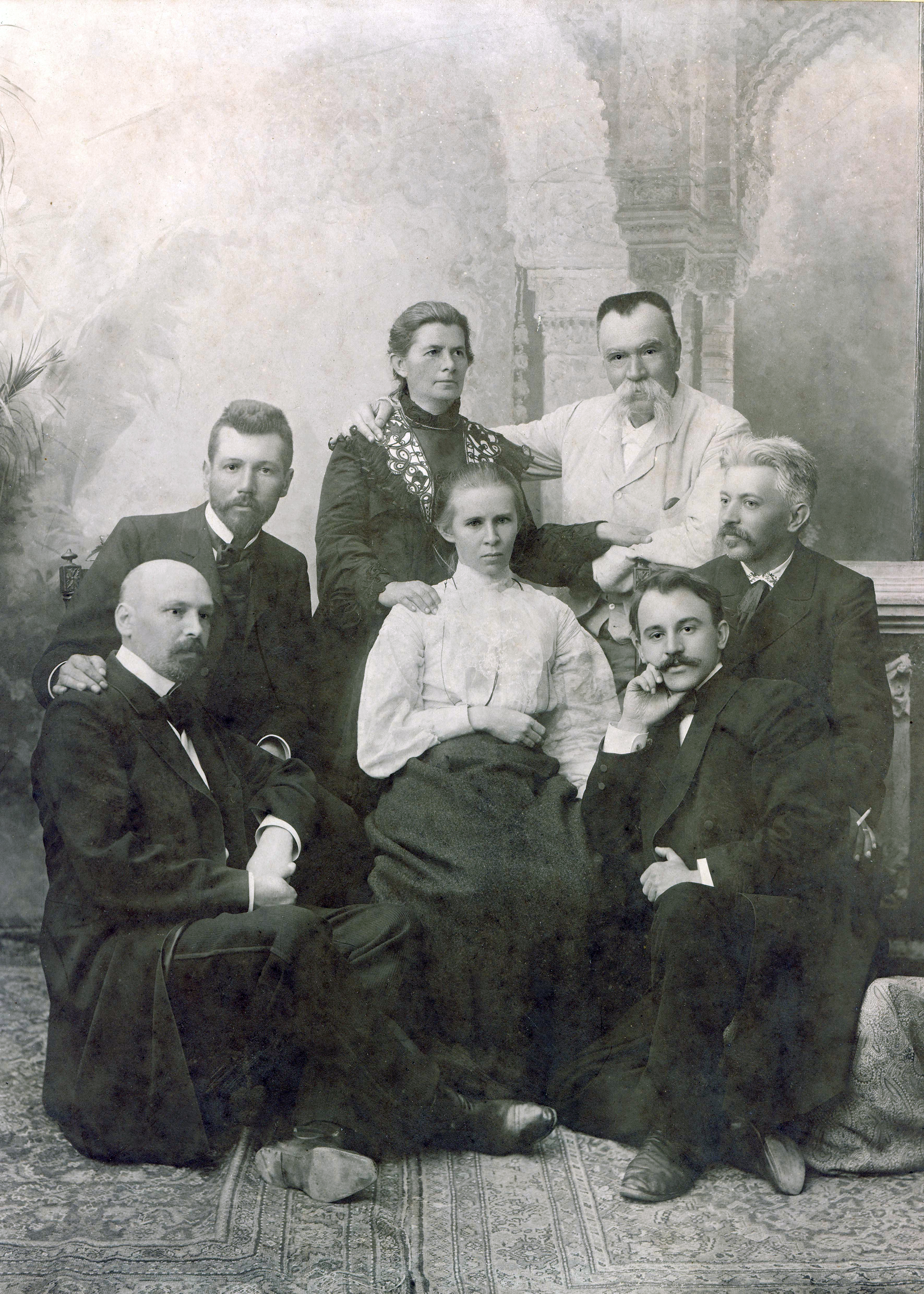 Передній ряд (зліва направо): Михайло Коцюбинський, Леся Українка, Гнат Хоткевич; задній ряд: Василь Стефаник, Олена Пчілка, Михайло Старицький, Володимир Самійленко.